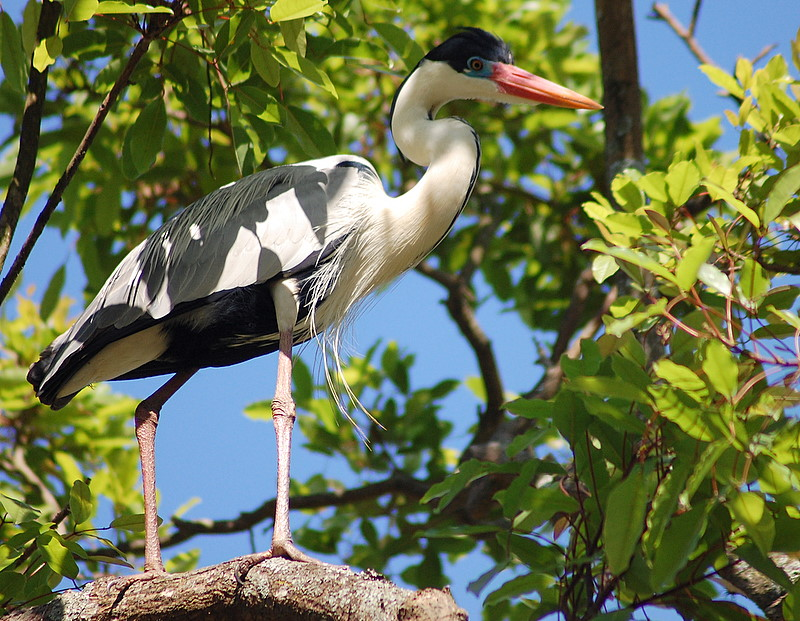 Ardea cocoi @ Jardim Botânico de São Paulo